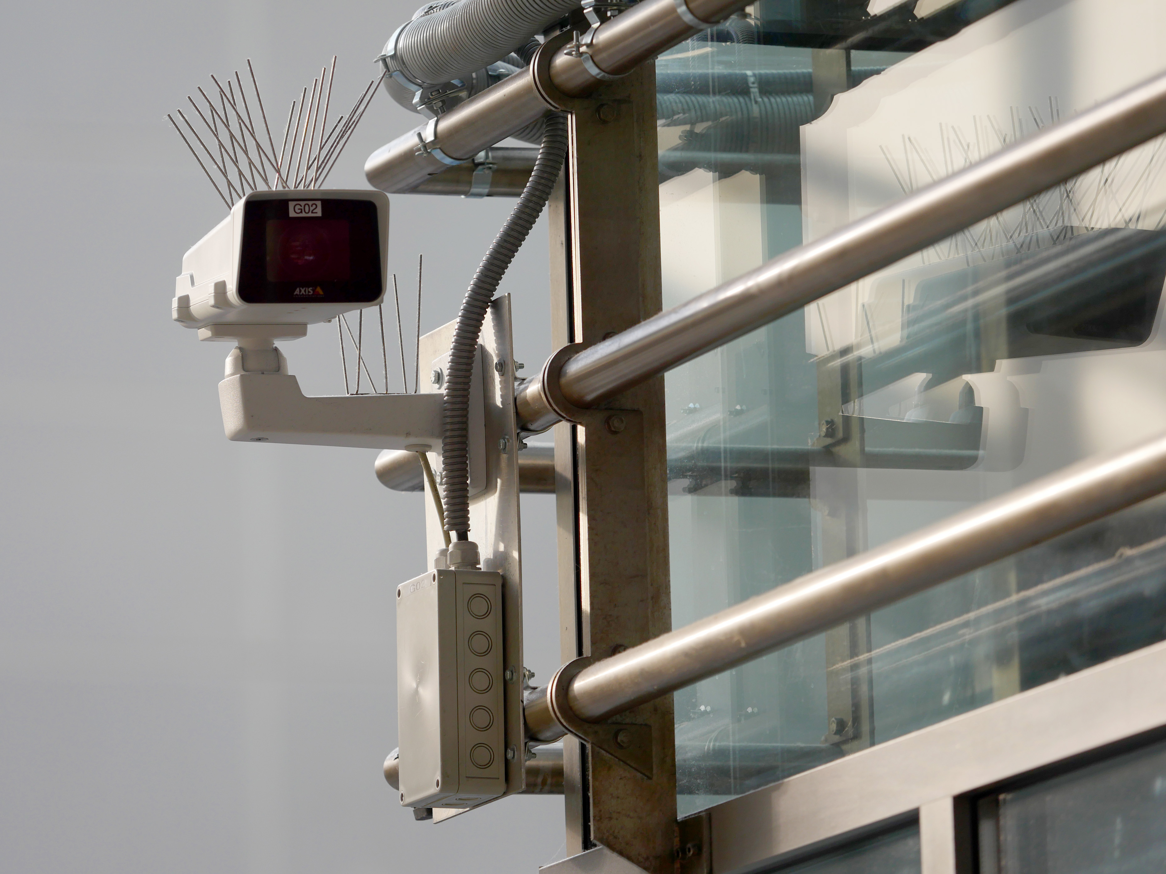 Überwachungskamera G02 der deutschen Bundespolizei zur Gesichtserkennung hinter dem rechten Eingang der Westhalle vom Bahnhof Berlin Südkreuz am Hildegard-Knef-Platz.